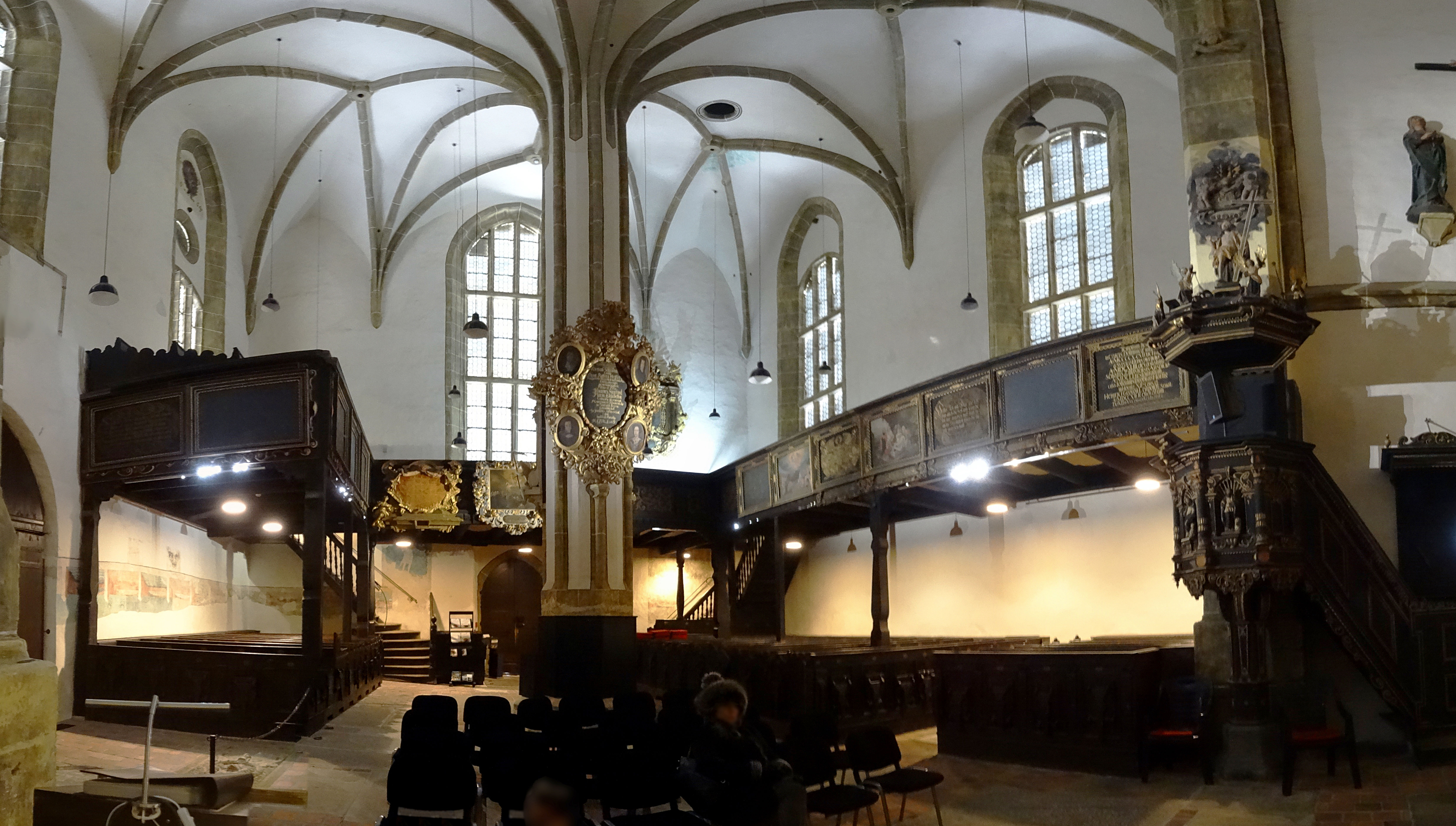 Innenraum Panorama der Kirche zum Heiligen Kreuz (Zittau), größter Einstützenraum in Deutschland